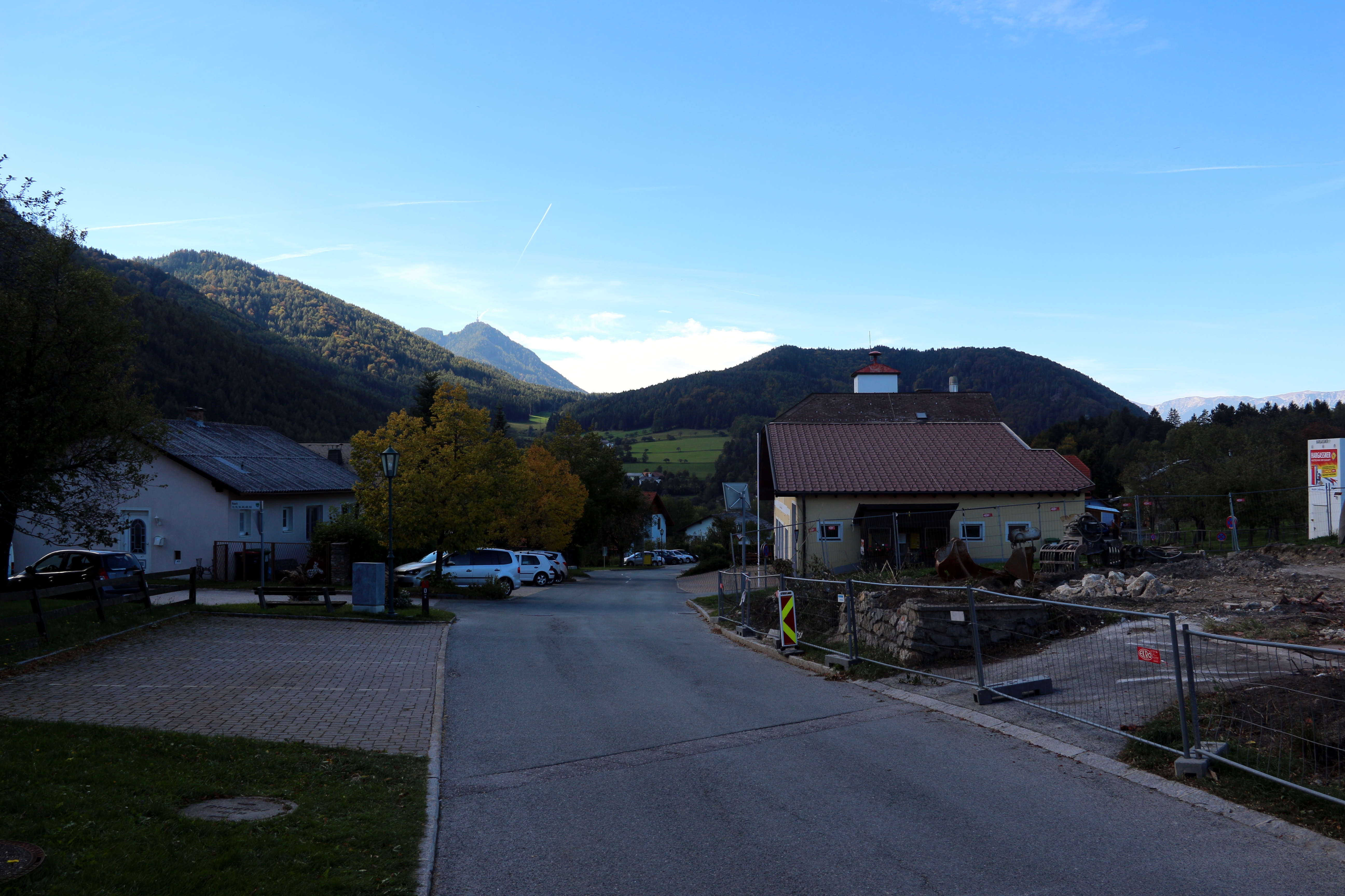 Ortsansicht von Raach am Hochgebirge, Niederöstereich. Im Hintergrund Mitterotter und Sonnwendstein mit Sender.